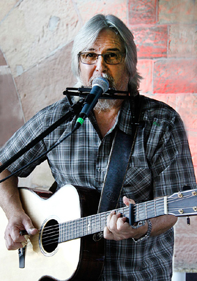 Lino Battiston bei einem öffentlichen Auftritt am 7. August 2016 im Rahmen der 4. Saarlouiser Festungstage auf der Vaubaninsel, Saarlouis. Foto: Achim Rapp